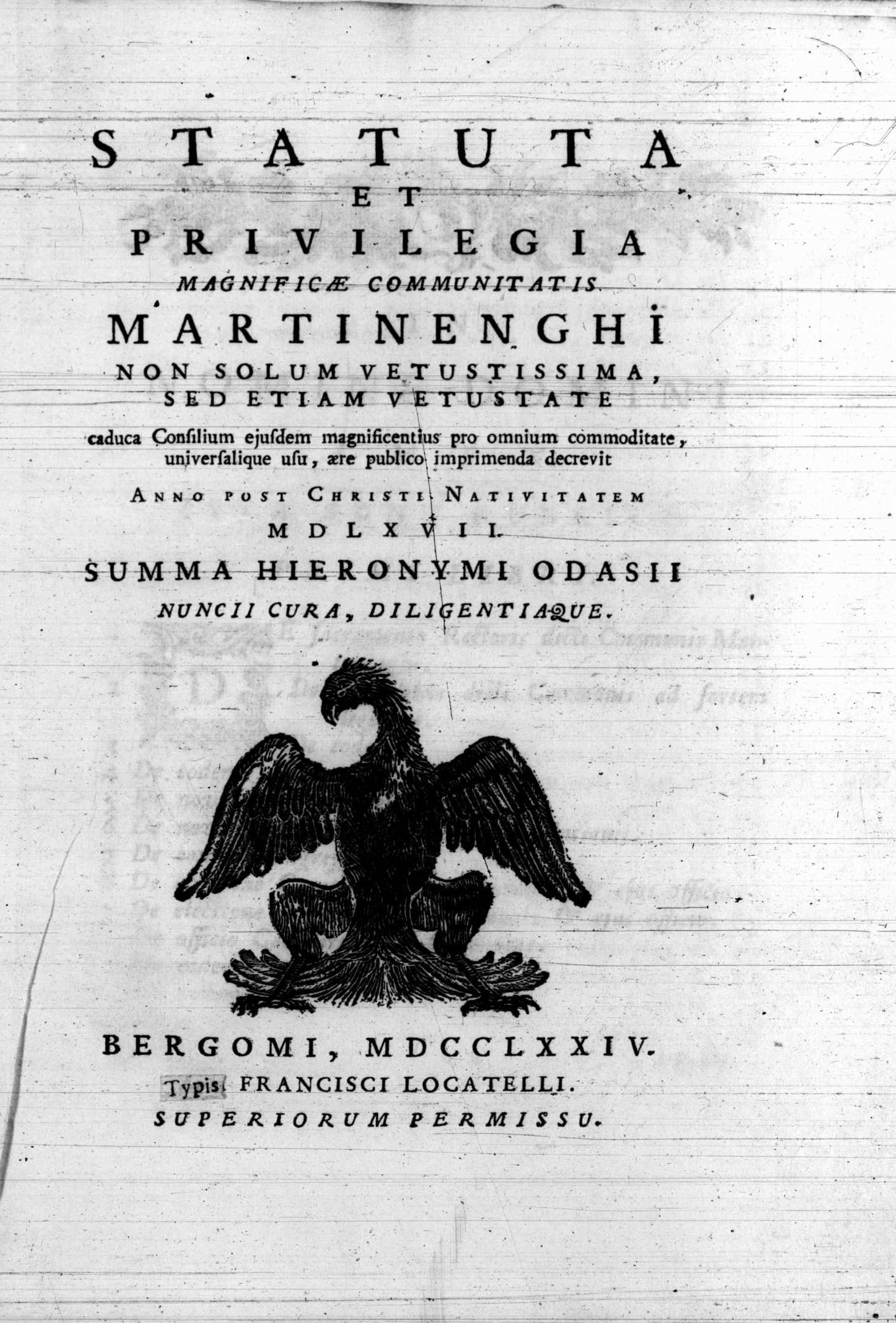 Frontespizio